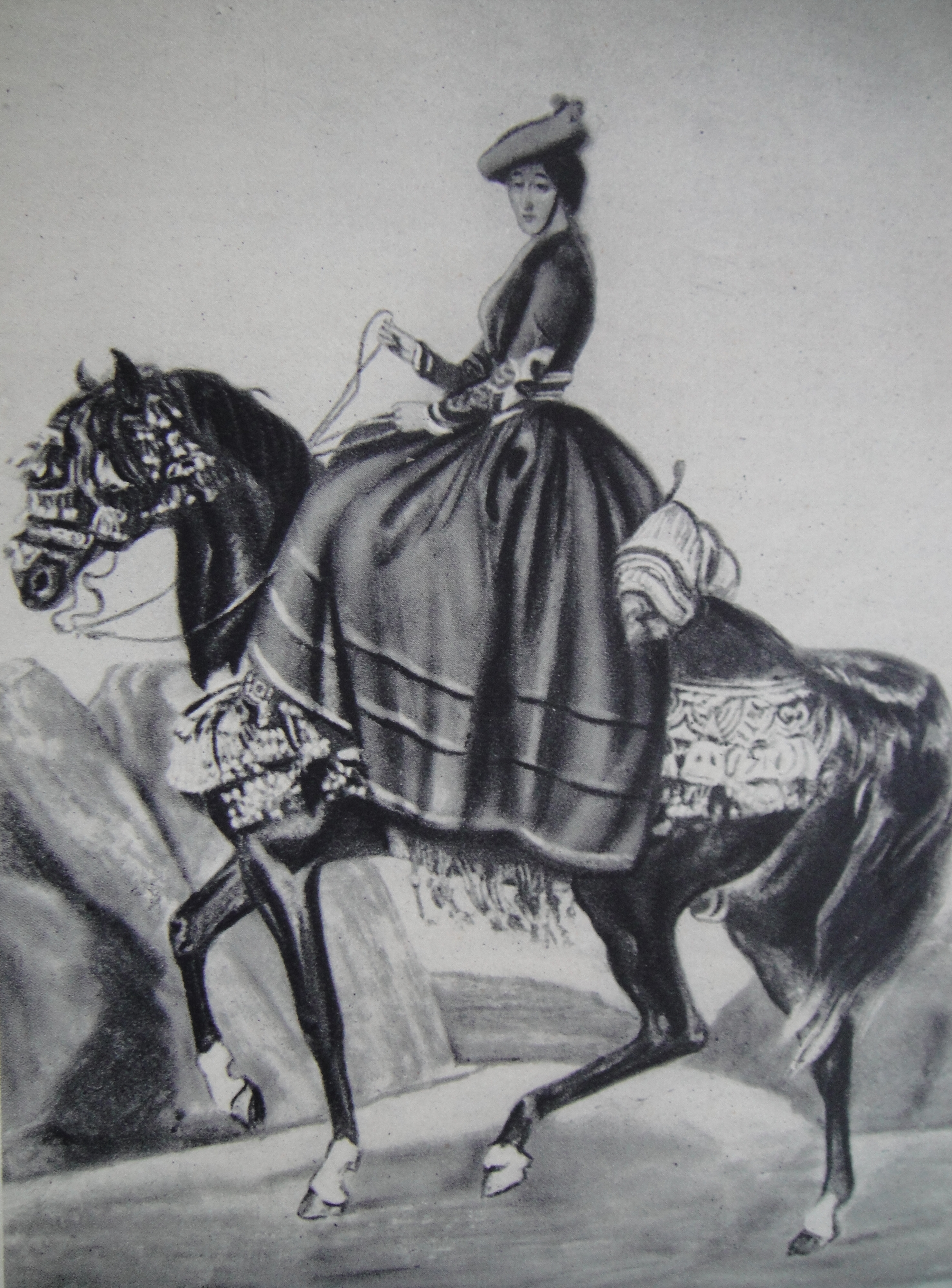 Gräfin Eugenie von Teba, die französische Kaiserin später wurde. Lithographie von A. Giroux entsprechend dem Gemälde Édouard Odier.